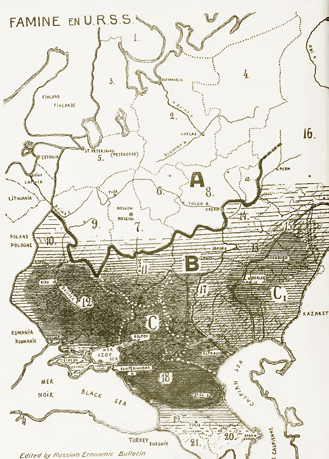 Famine in USSR, 1933. Areas of most disastrous famine marked with black. Explanation of symbols on the map: A - grain-consuming regions, B - grain-producing regions. C - former land of Don, Kuban and Terek cossacks, C1 - former land of Ural and Orenburg cossacks. 1. Kola Peninsula, 2. Northern region, 3. Karelia, 4. Komi, 5. Leningrad Oblast, 6. Ivanovo Oblast, 7. Moscow Oblast, 8. Nizhny Novgorod region, 9. Western Oblast. 10. Byelorussia, 11. Central Black Earth Region, 12. Ukraine, 13. Central Volga region, 14. Tataria, 15. Bashkiria, 16. Ural region, 17. Lower Volga region, 18. North Caucasus Krai, 19. Georgia, 20. Azerbaijan, 21. Armenia. Объяснение обозначений на карте: A - районы потребляющей полосы, B - районы производящей полосы. C - бывшая территория донских, кубанских и терских казаков, C1 - бывшая территория уральских и оренбургских казаков. 1. Кольский полуостров, 2. Северный край, 3. Карелия, 4. Область Коми, 5. Ленинградская (Петербургская) область, 6. Ивановская промышленная область, 7. Московская область, 8. Нижегородский край, 9. Западная область. 10. Белоруссия, 11. Центрально-Чернозёмная область, 12. Украина, 13. Средне-Волжский край, 14. Татария, 15. Башкирия, 16. Уральская область, 17. Нижневолжский край, 18. Северо-Кавказский край, 19. Грузия, 20. Азербайджан, 21. Армения.